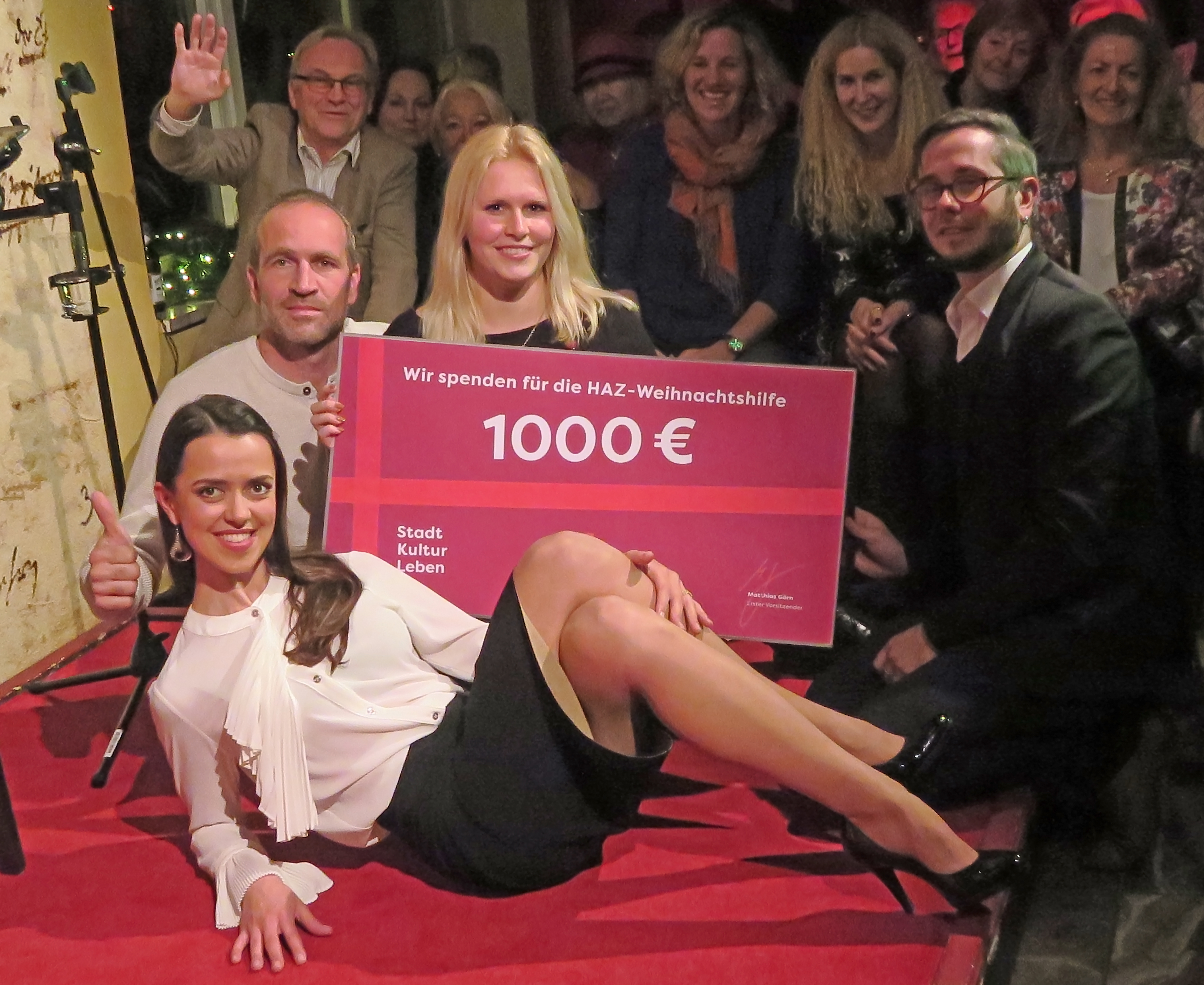 Nach den Darbietungen der Jazz-Sängerin Oxana Voytenko im Leibniz Theater überreichte die Geschäftsführerin vom Freundeskreis Hannover auf der Bühne einen - hier symbolisch vergrößerten - Scheck für die von der Hannoverschen Allgemeinen Zeitung organisierte HAZ-Weihnachtshilfe' zugunsten bedürftiger Menschen in und um die niedersächsische Landeshauptstadt. Im Vordergrund von links: Theaterdirektor Joachim Hieke, Sängerin Oxana Voytenko (liegend), Freundeskreis-Geschäftsführerin Katharina Sterzer sowie der Moderator des Abends, der Journalist, Musiker und Schriftsteller Jan Egge Sedelies ...